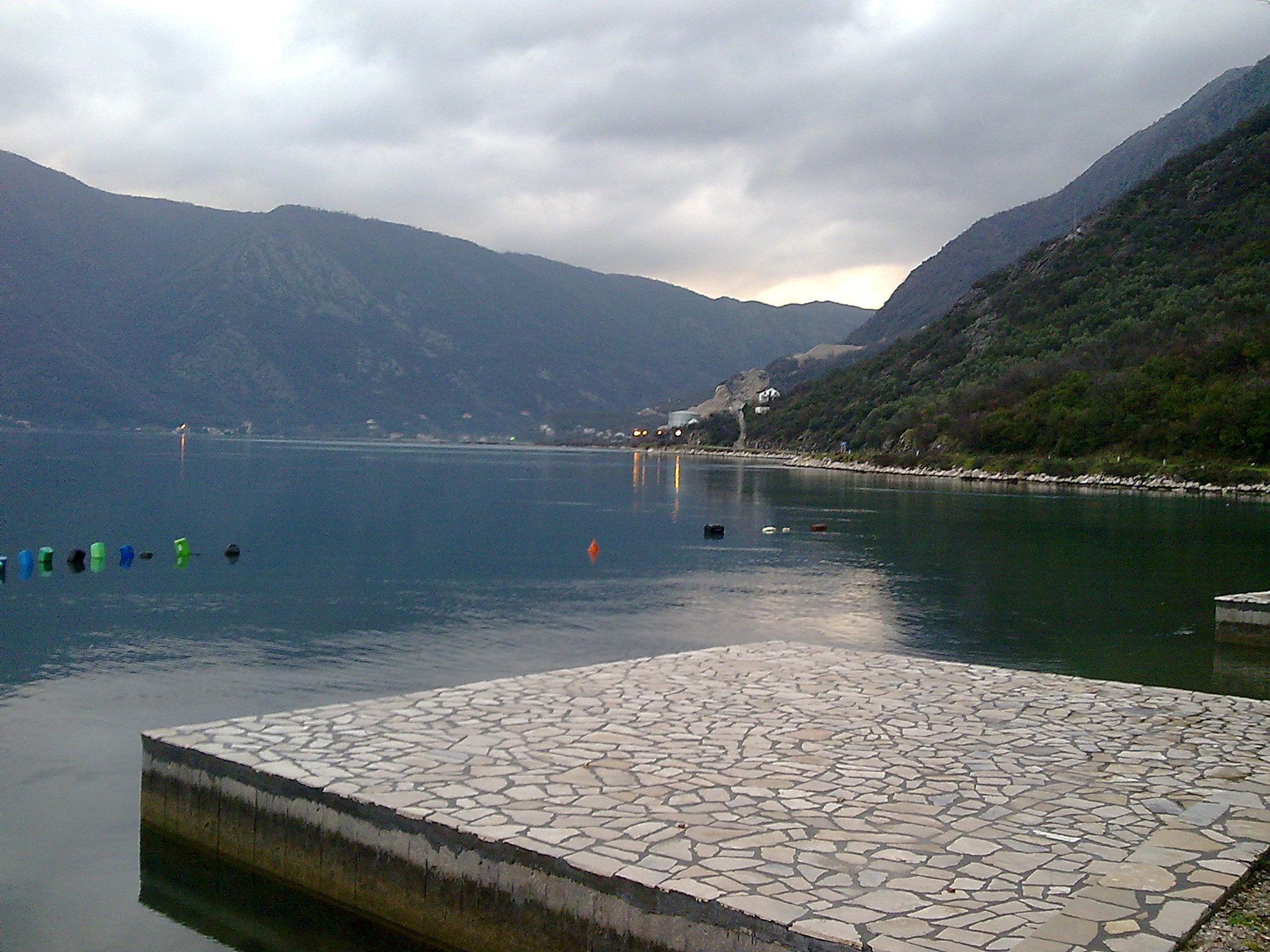 Strp, Montenegro